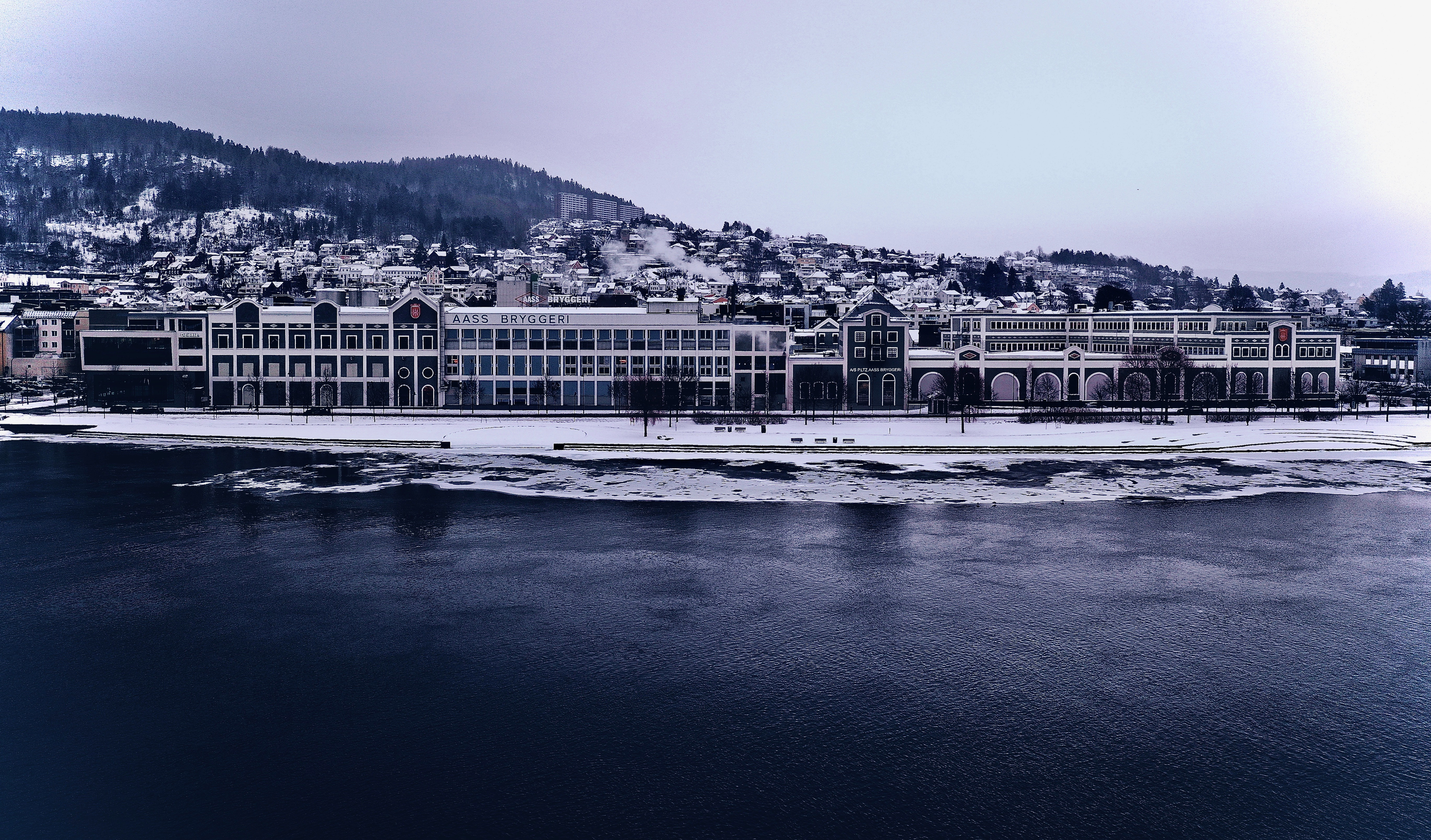 Aass